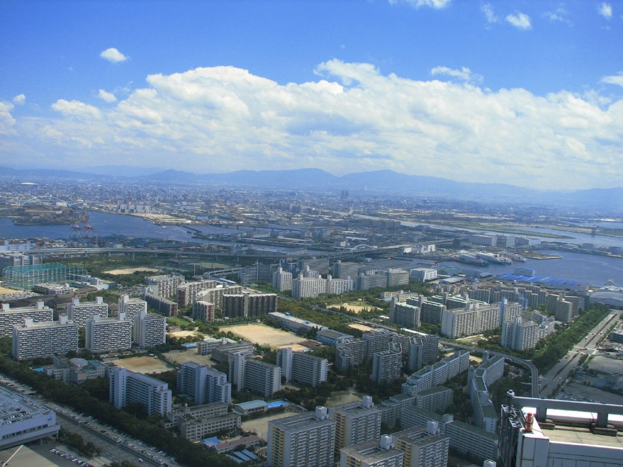 大阪港東